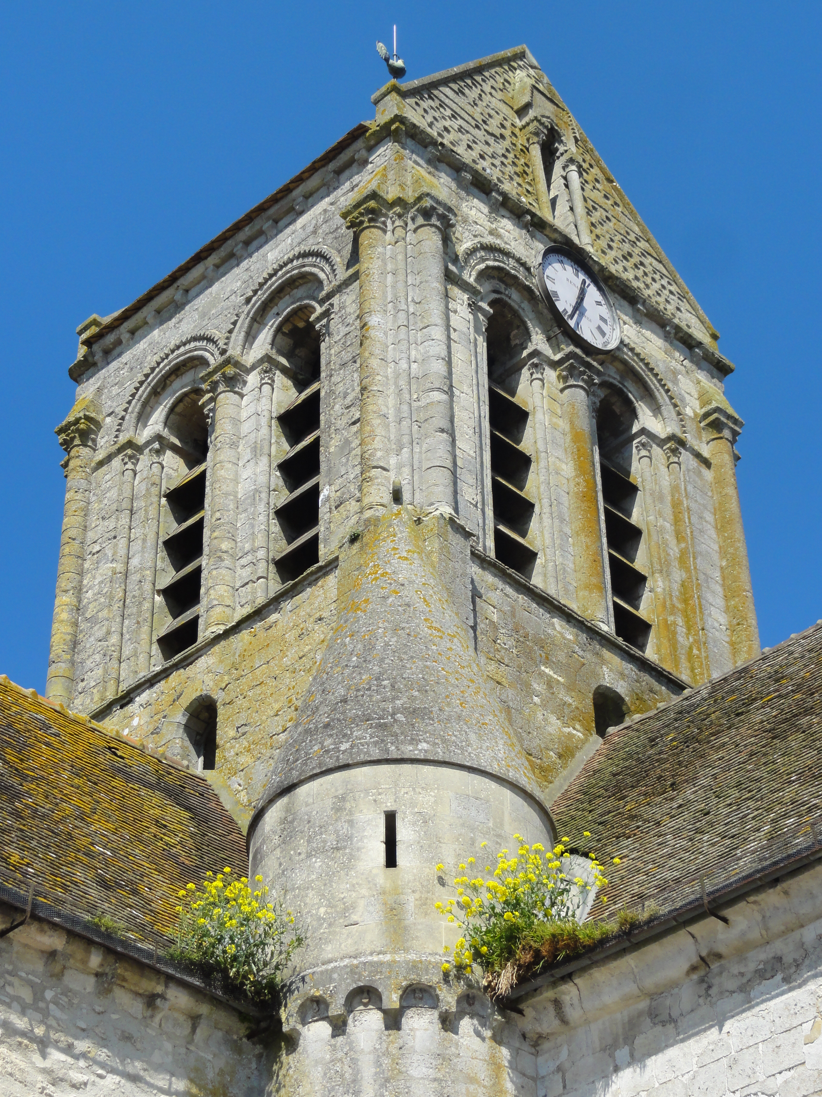 Église Notre-Dame-de-la-Nativité de Lavilletertre - voir titre.